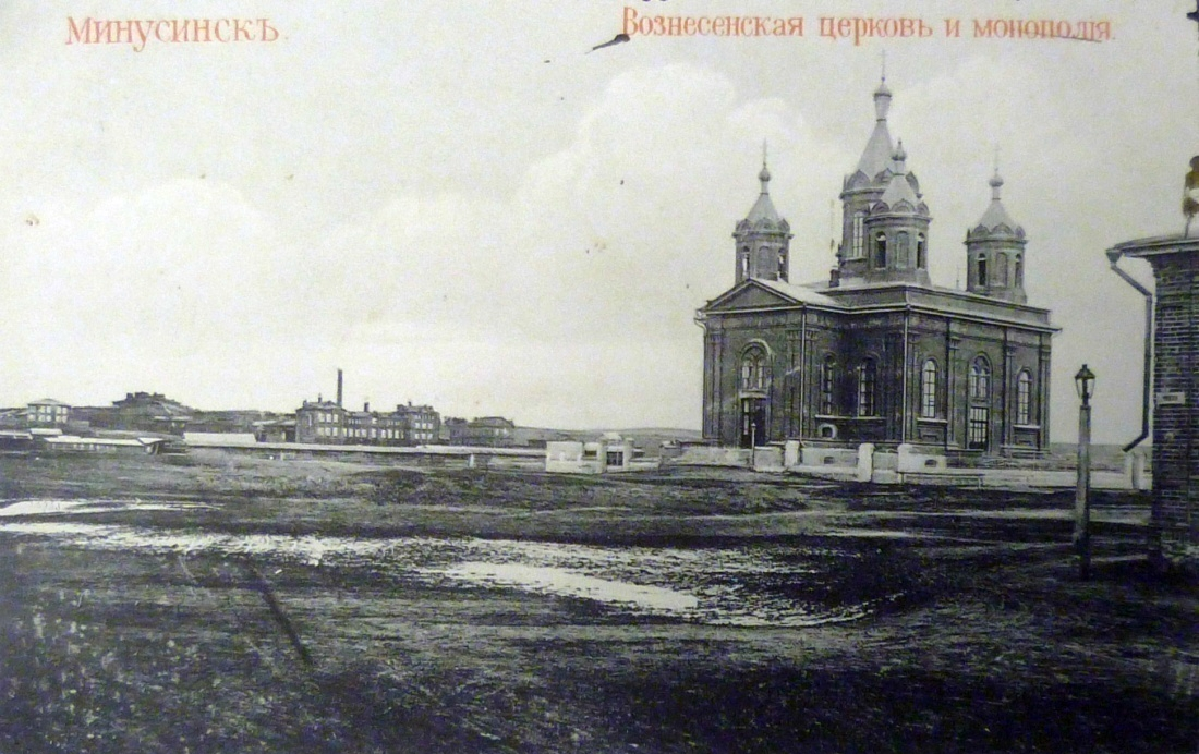 Минусинск. Вознесенская церковь. Архитектор А.А. Фольбаум. 1906–1911 гг. Открытка начала ХХ в. МРКМ